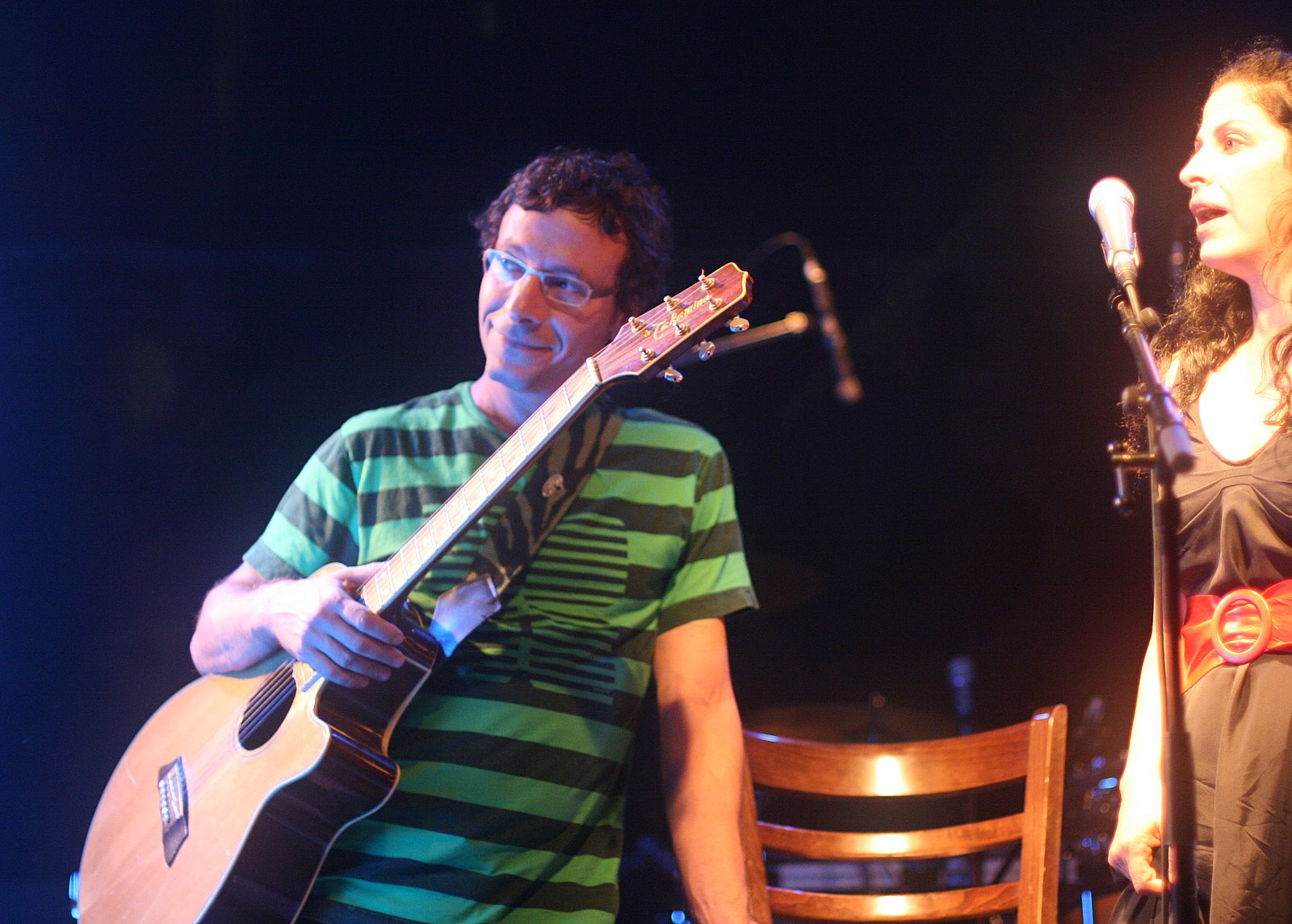 רשימת שירים משותפים- לילות של ירח מלא, פרח שחור, אני אחכה\ סולו ערן, תותים\סולו אפרת